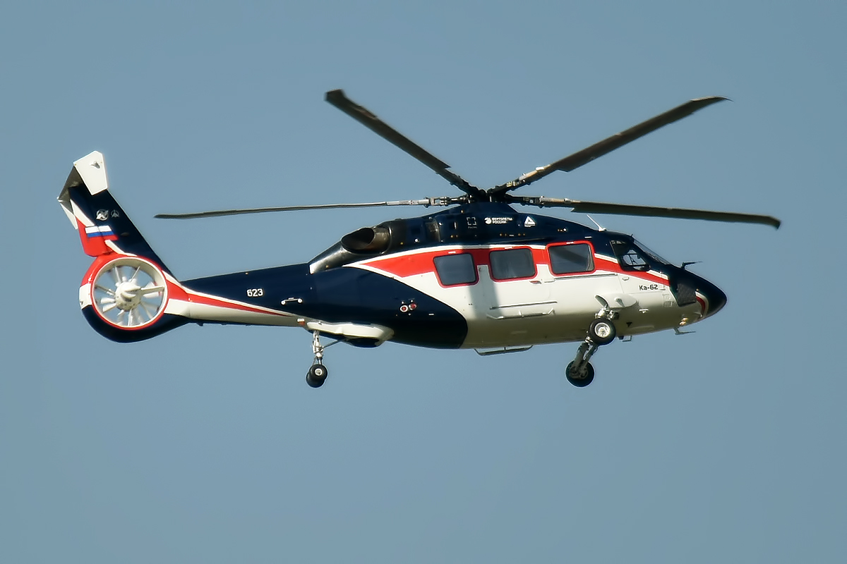 Kamov, 623, Kamov Ka-62